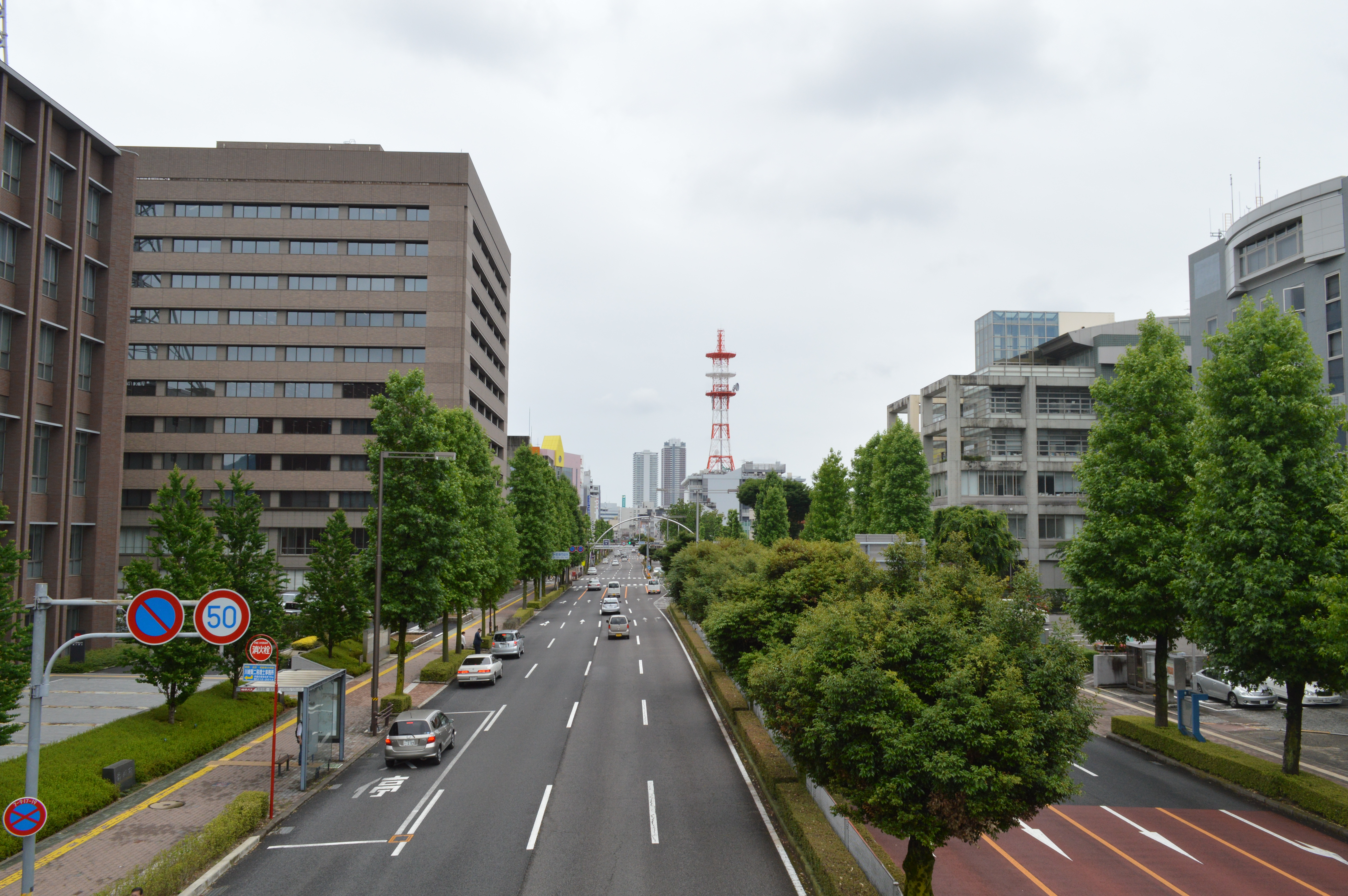 岐阜県岐阜市の金華橋通り。岐阜市民会館前の歩道橋から南を向いて撮影。正面にはNTT金町ビルの赤い鉄塔やシティタワー43などが見える。